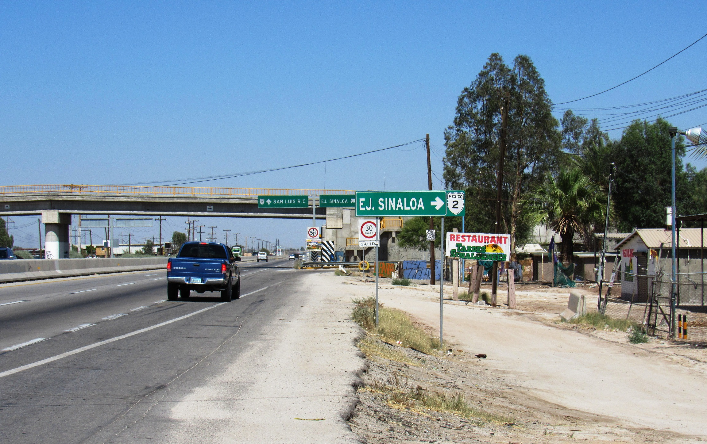 vista de la carretera federal 2 al lado del poblado del Ejido Sinaloa.